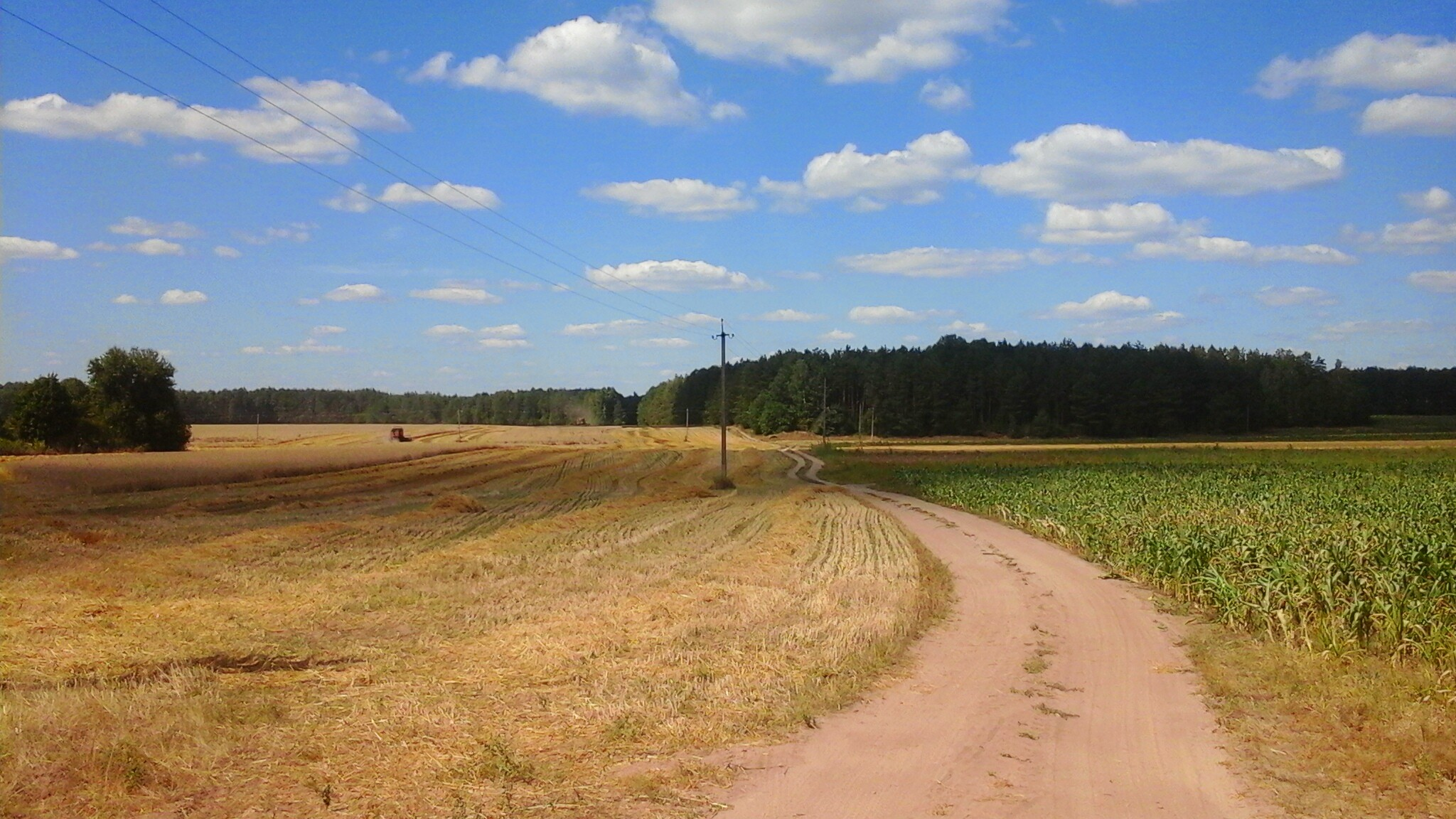 Дорога на Пацевщину